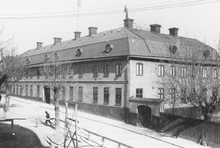 Tottieska malmgården kring 1900, Södermalm, Stockholm